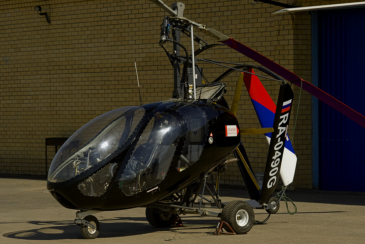 Autogyro "Aero-Astra Hunter-3"